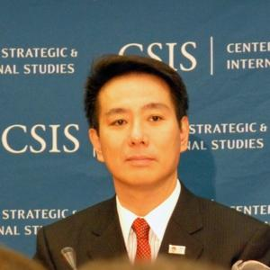 2011年1月6日，前原诚司在美国演说。